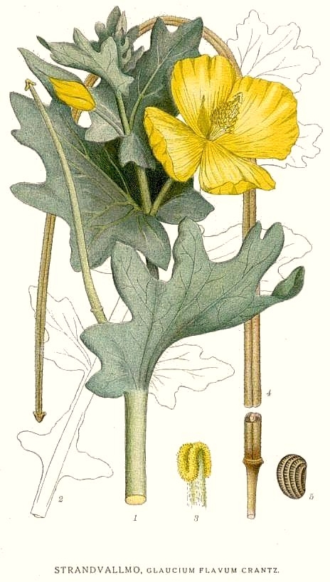 Original Description Strandvallmo, Glaucium flavum Grantz.